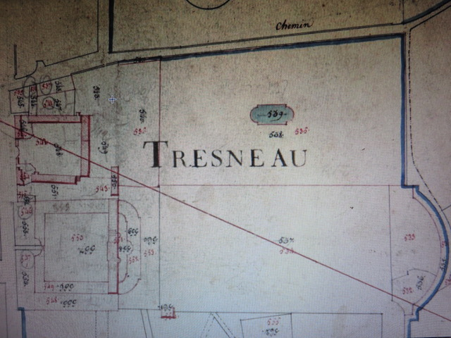 Plan du château de Tresneau et de sa ferme en 1819. Le château a été démoli, reste son emplacement.